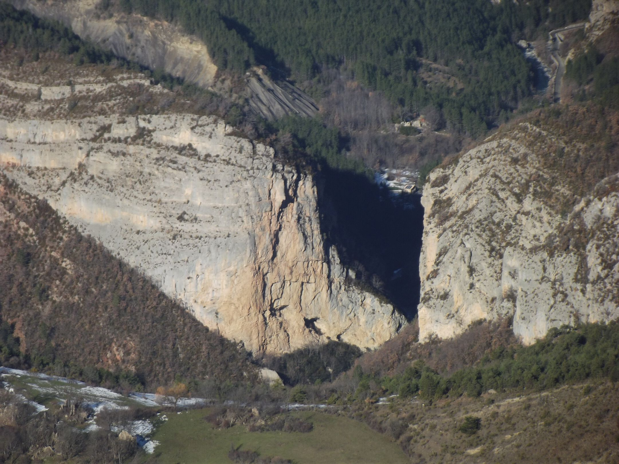 Clue du Pérouré vue de la Colle (1551 m)